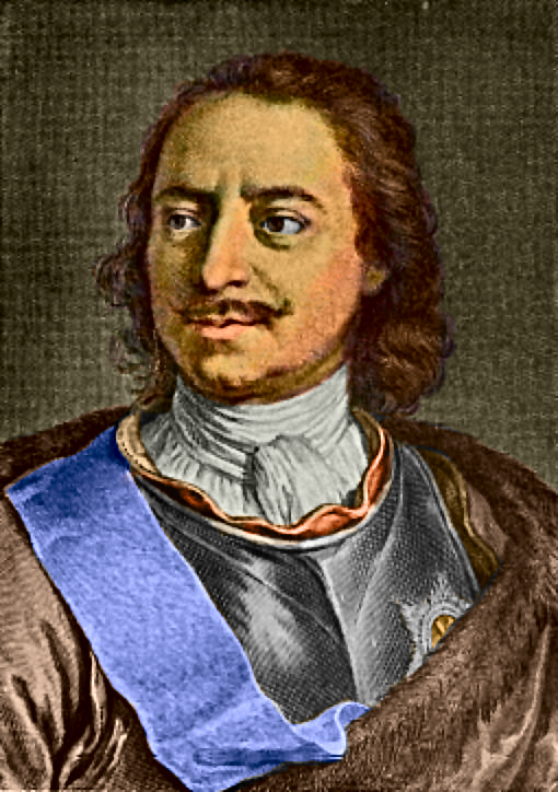 Tsaar Peter de Grote PD tekening van UT Library, ingekleurd naar bestaande schilderijen